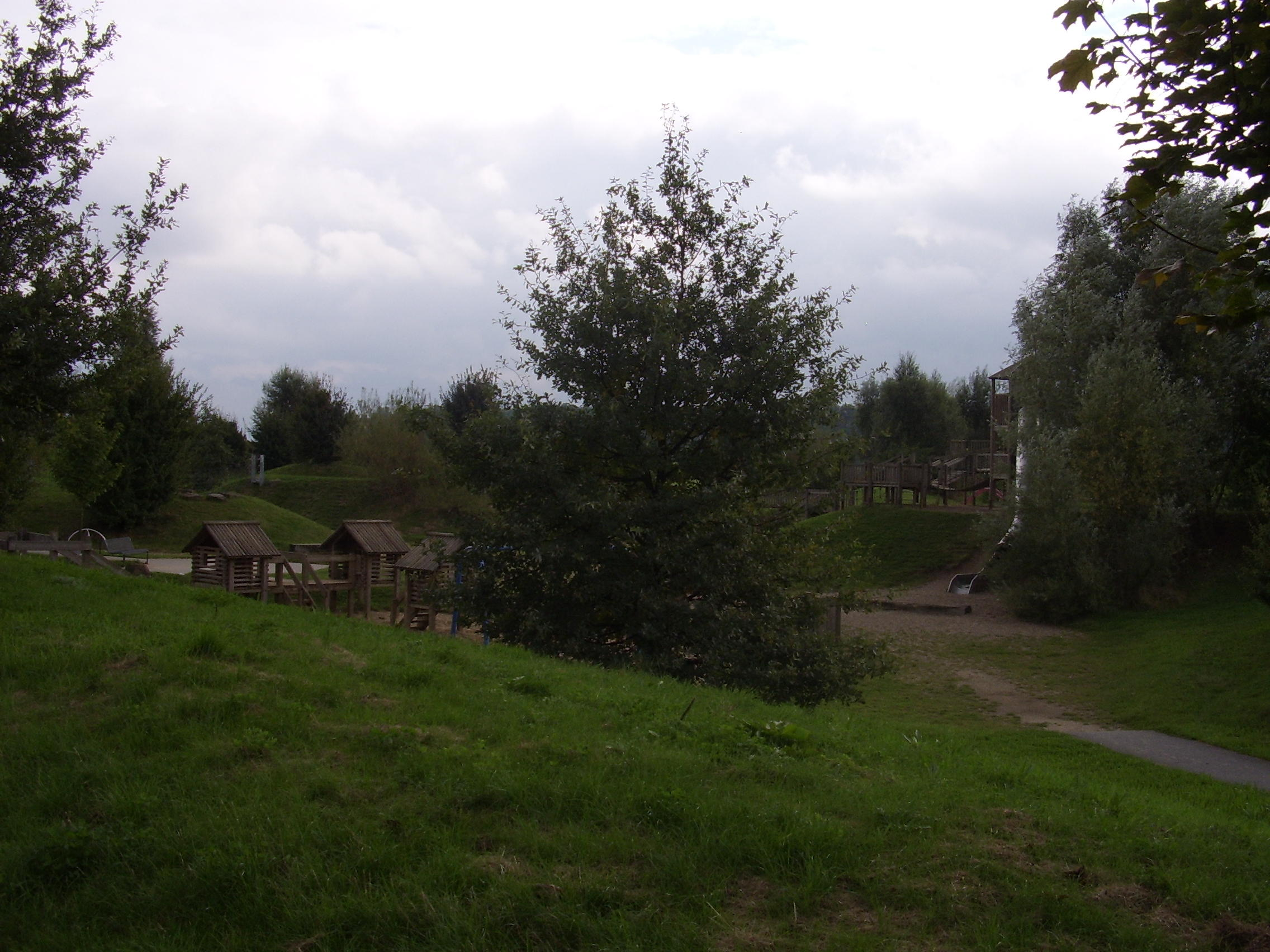 Abenteuerspielplatz im Neubaugebiet A (Allerheiligen)